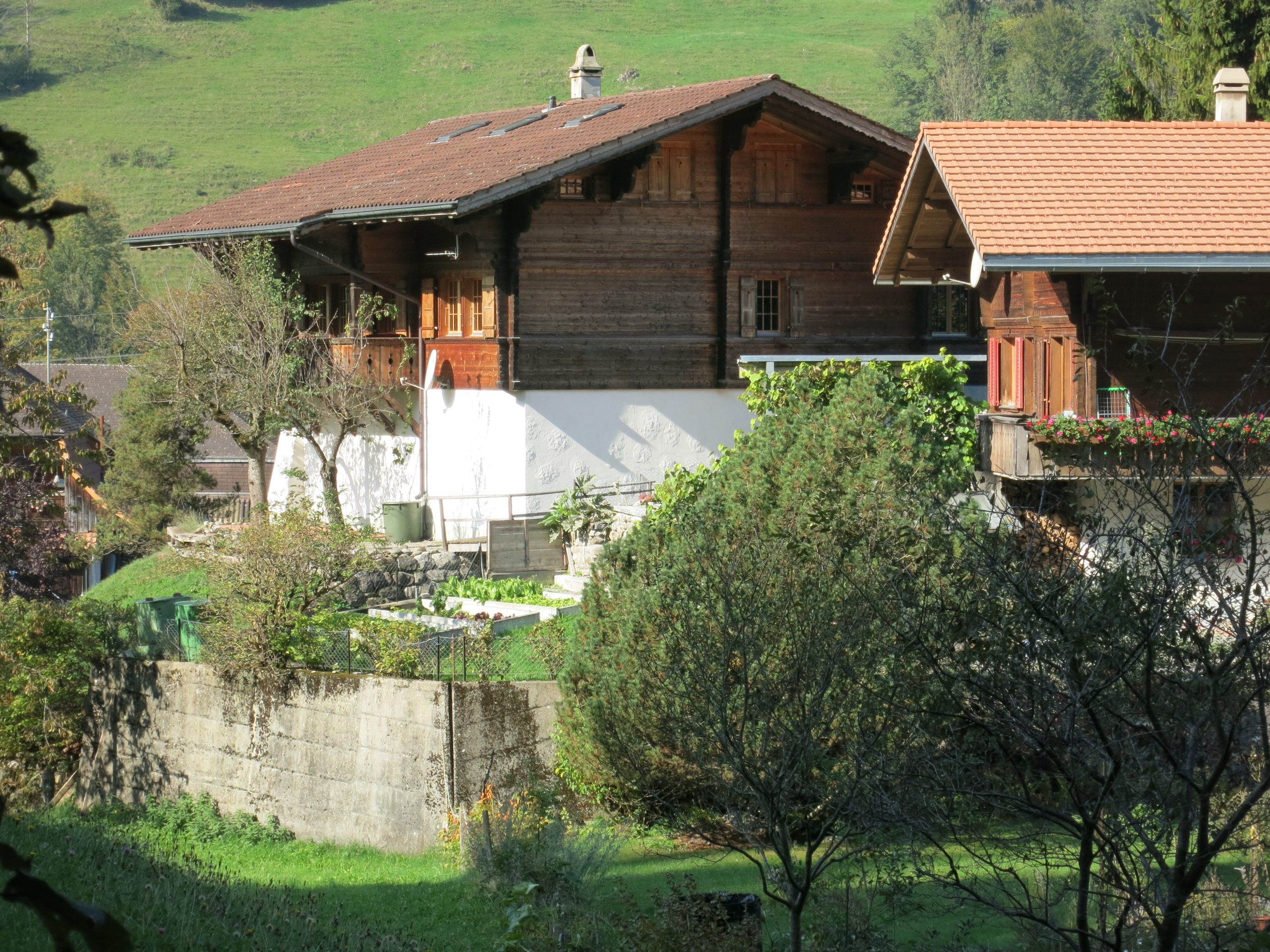 Sperrstelle Mülenen BE, Schweiz : A1976 under the house